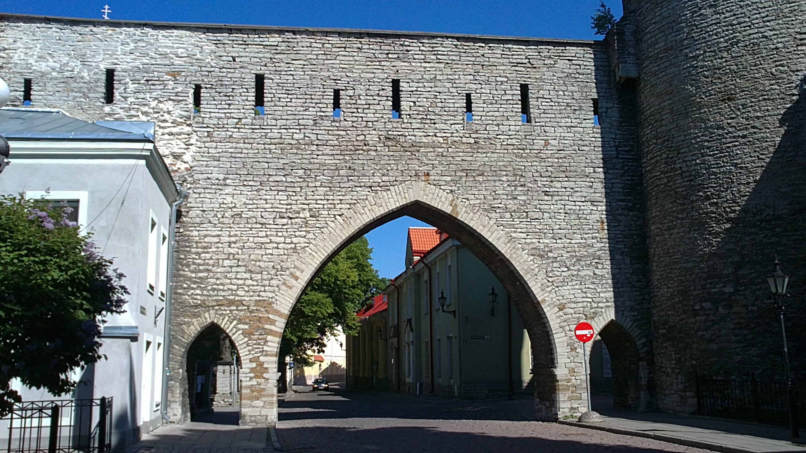 Kloostrivärav (Nunnavärav) Tallinna vanalinnas, ehitatud 19. sajandi lõpus Wilhelm Neumanni projekti järgi Tallinna linnamüüri läbimurdena. Vaade Nunne tänava poolt